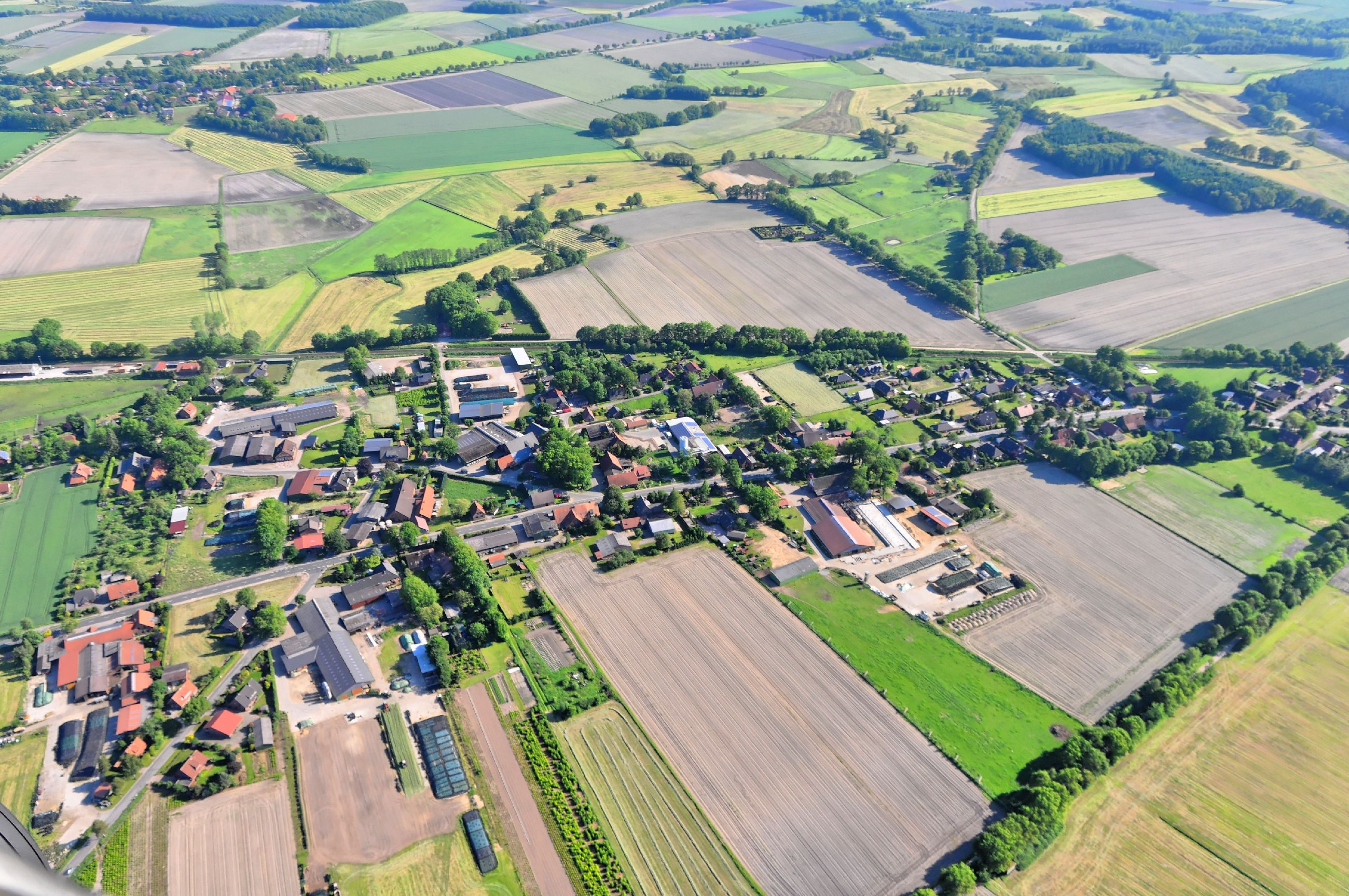 Überführungsflug vom Flugplatz Nordholz-Spieka über Lüneburg, Potsdam zum Flugplatz Schwarzheide-Schipkau